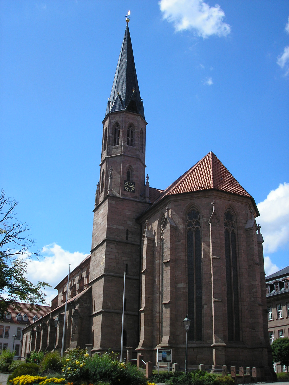 Die Kirche St. Martin in Heiligenstadt (Thüringen).